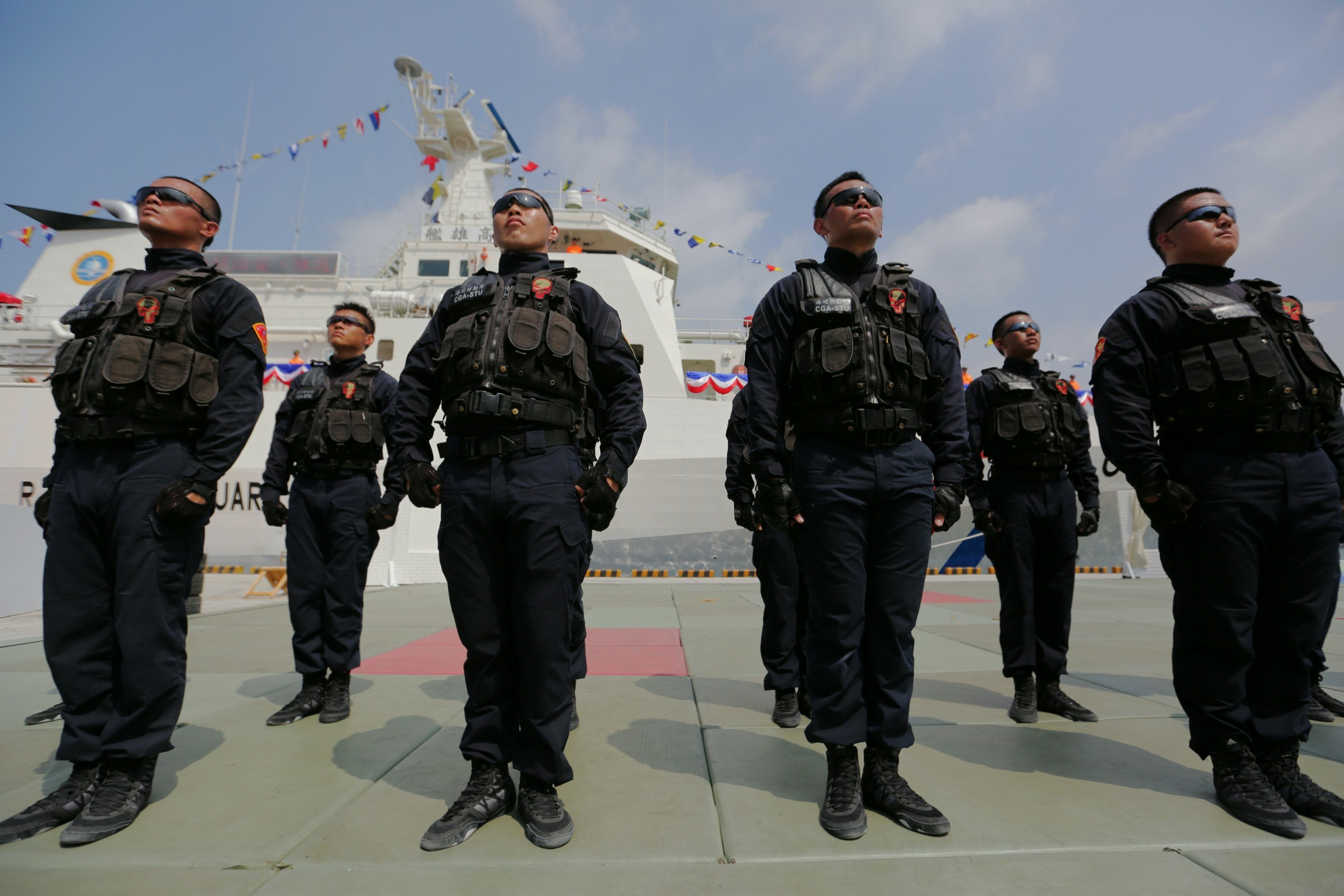 06.10 總統出席世界海洋日暨海安九號演習